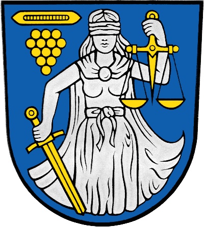 Wappen der Stadt Wilthen (Oberlausitz)